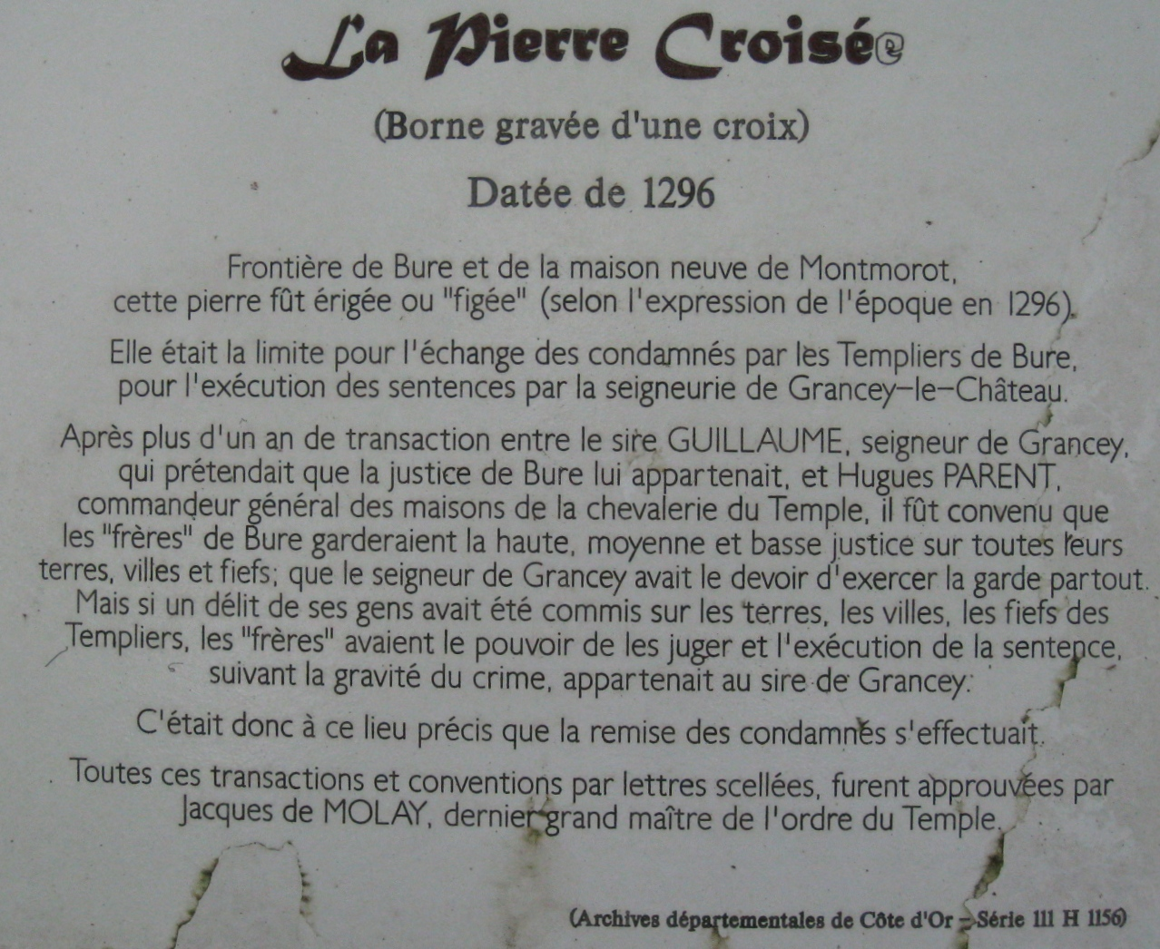 Panneau explicatif placé sur le lieu où se trouve la